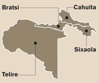 Mapa de los distritos del cantón de Talamanca, provincia de Limón, Costa Rica.